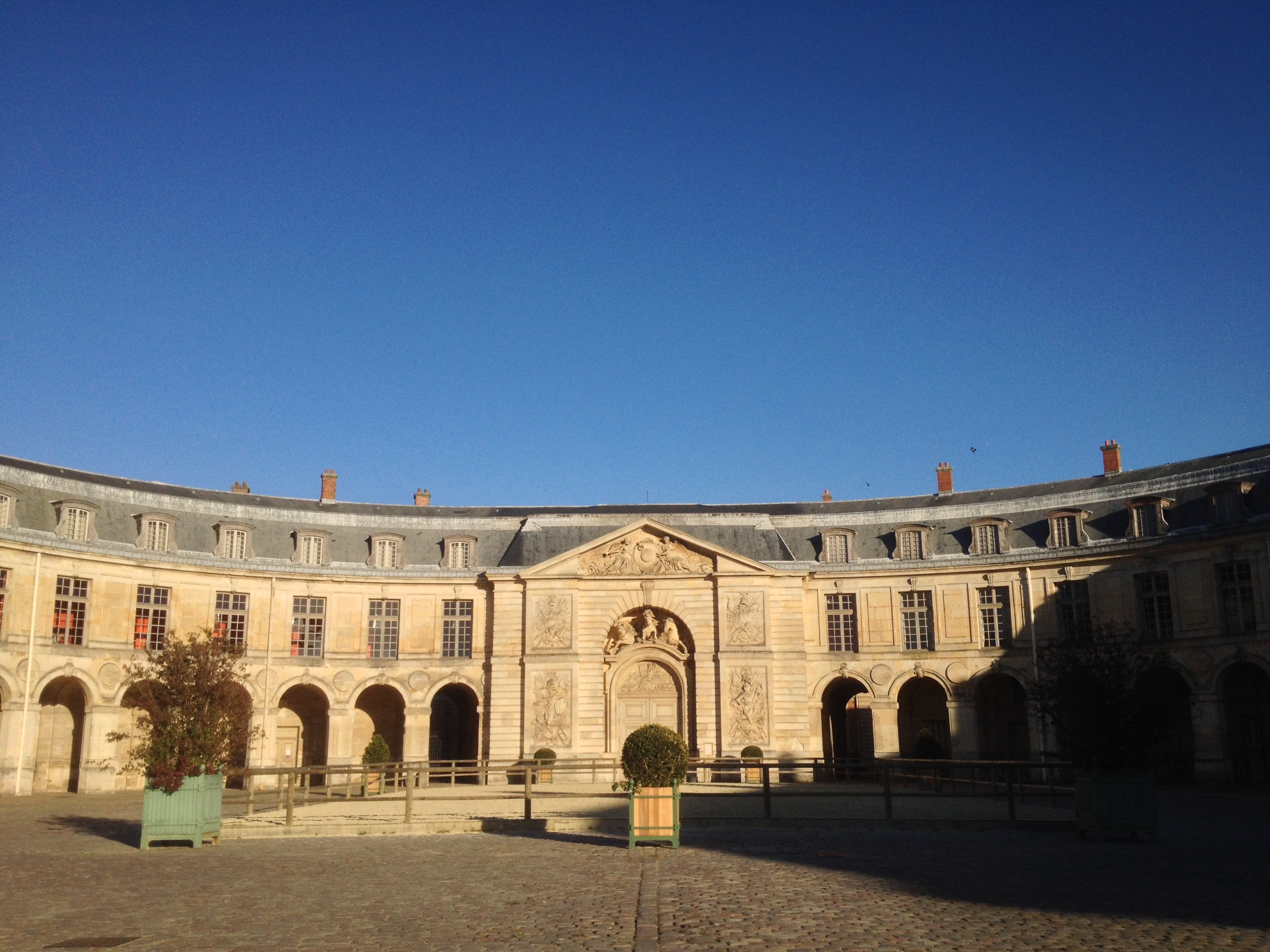 la façade de la Grande Ecurie à Versailles